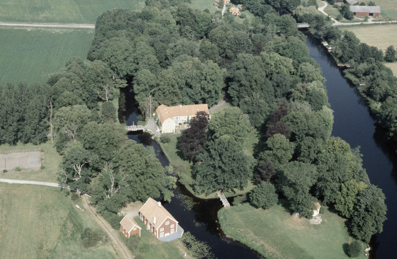 Elleholms hovgård. Bilden är tagen mot (väderstreck): NNO Motiv: Elleholm Nyckelord: Flygbilder, Riksintressen Kategori: Herrgårds-/slottslandskap Elleholms hovgård. Bilden är tagen mot (väderstreck): NNO.